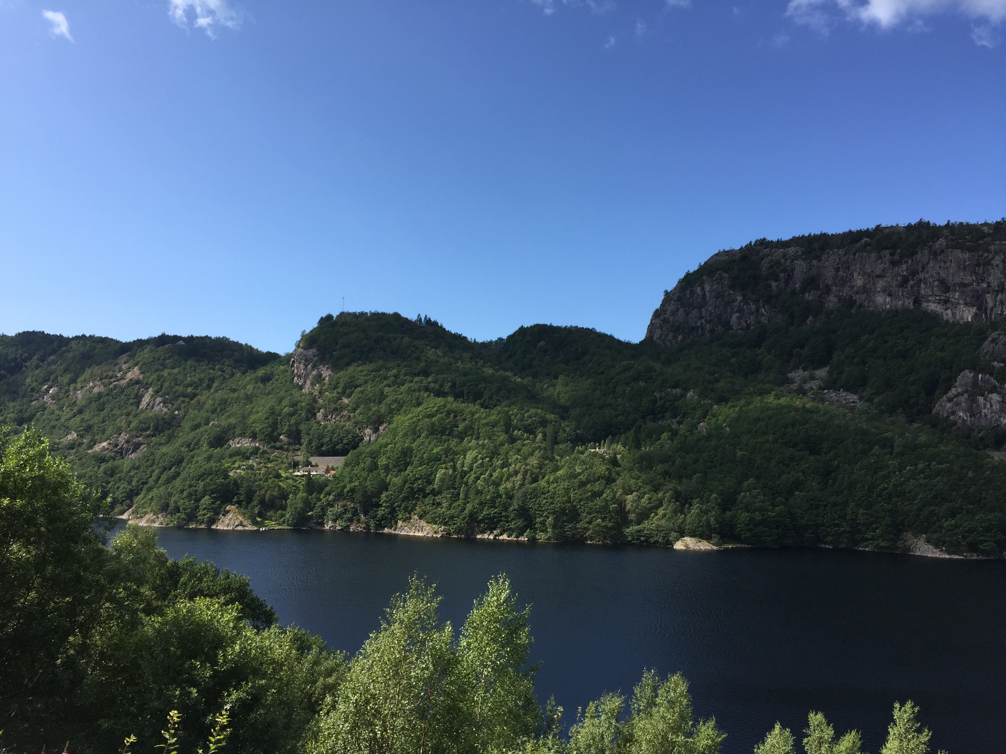 Loia, See in Vest-Agder, Norwegen